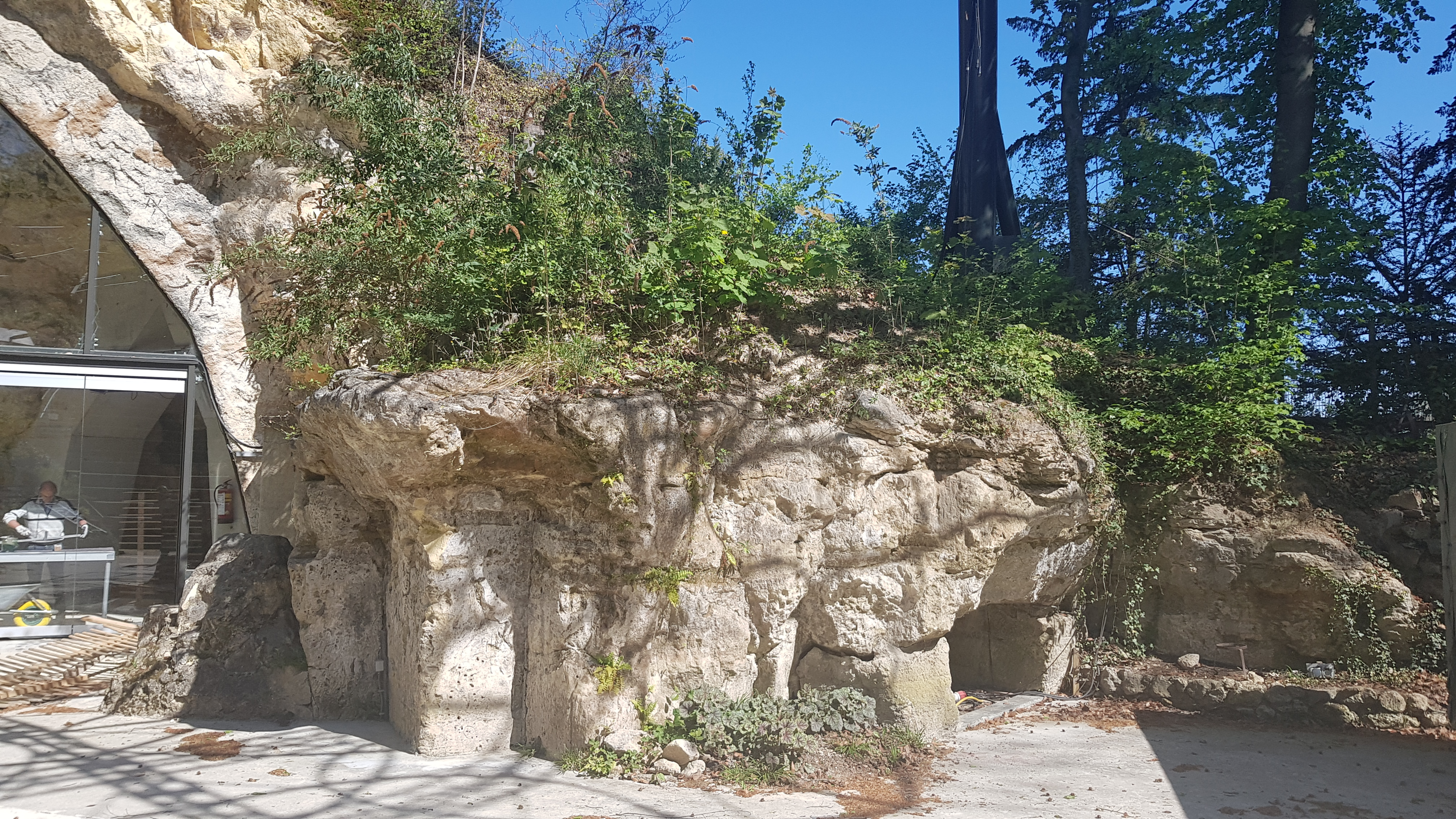 Heksenkeuken, Valkenburg, Nederland